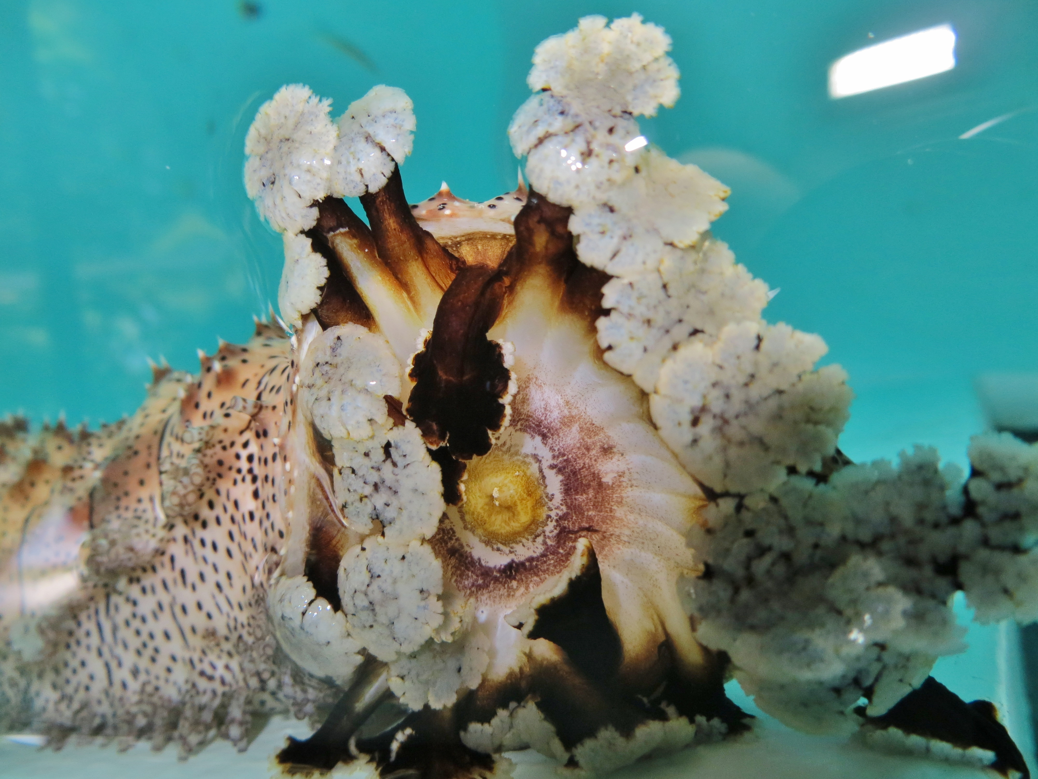 Gros plan sur les tentacules et la bouche d'une holothurie rayée (Pearsonothuria graeffei) aux Maldives.